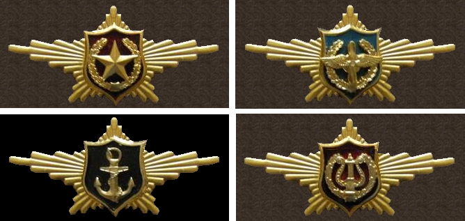 ОРПК РФ